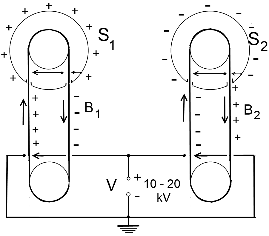 Van de Graaff Accelerator scheme